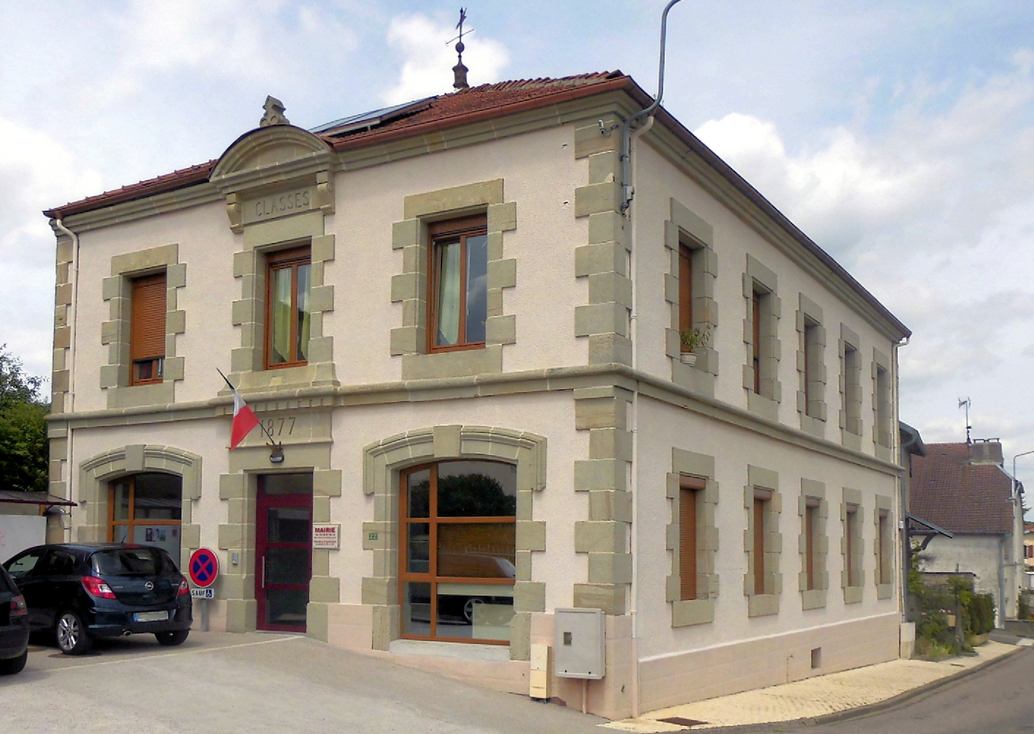 La mairie de Lironcourt